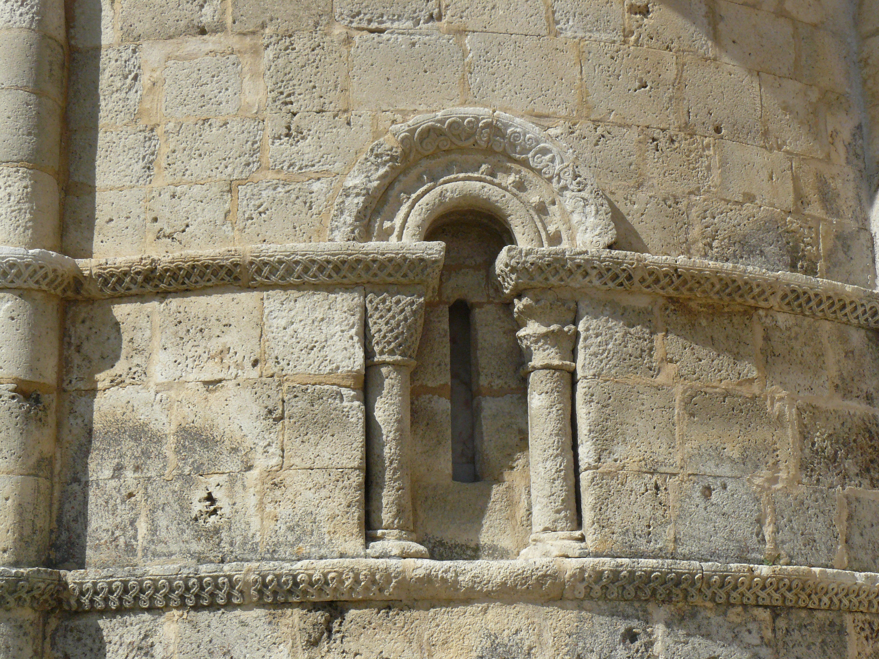 Iglesia de San Bartolomé y capilla de San Galindo, Campisábalos, Guadalajara.